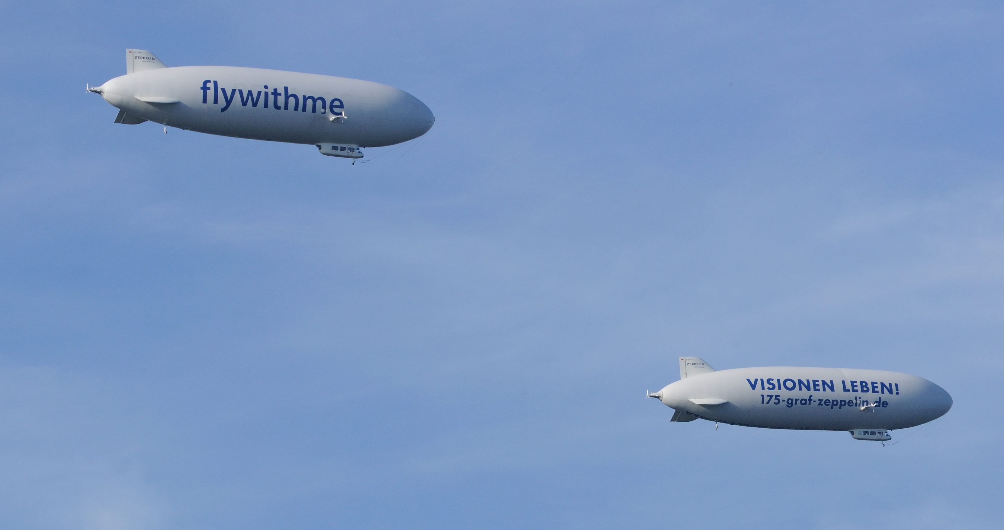 Switzerland, Canton of Schaffhausen, Dörflingen